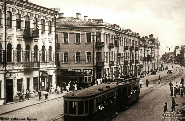 Дамы на левай часцы паштоўкі сёньня адносяцца да вуліцы Валадарскага, а раней гэта было скрыжаванне вуліц Захар'еўскай (Савецкай) і Серпухаўскай. На месцы, дзе едзе трамвай сёння стаіць гасцініца "Мінск". (У.Ліхадзедаў, "Мінск. Падарожжа ў часе", Мінск, Тэхналёгія, 2008г.)